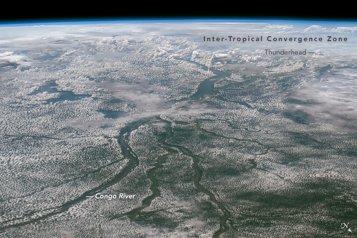 Image satelital de parte de la Cuenca del río Congo, mostrando nítidamente los ríos sin nubes debido al fenómeno de la diatermancia que impide o limita la convección atmosférica sobre los cauces.